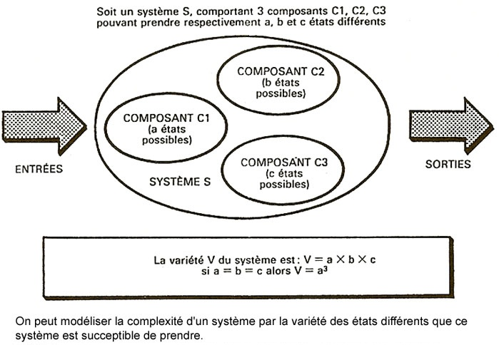 On peut modéliser la complexité d'un système par la variété des états différents que ce système est succeptible de prendre. Lorsque l'on fusionne plusieurs systèmes, leurs variétés (ou complexités) ne s'additionnent pas, elles se multiplient entre elles. source : CIM, les nouvelles perspectives de la production, Jean-Baptiste Waldner, DUNOD, 1990, reproduit avec l'autorisation de l'auteur.